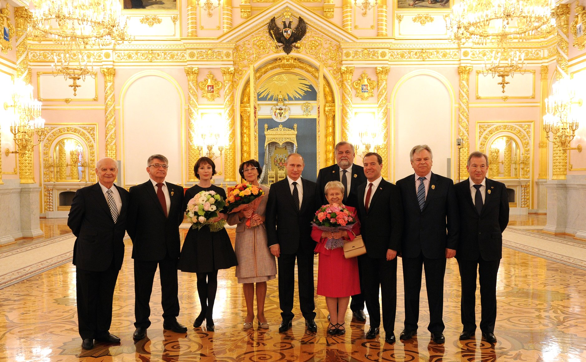 Вручение Государственных премий Российской Федерации за 2014 год